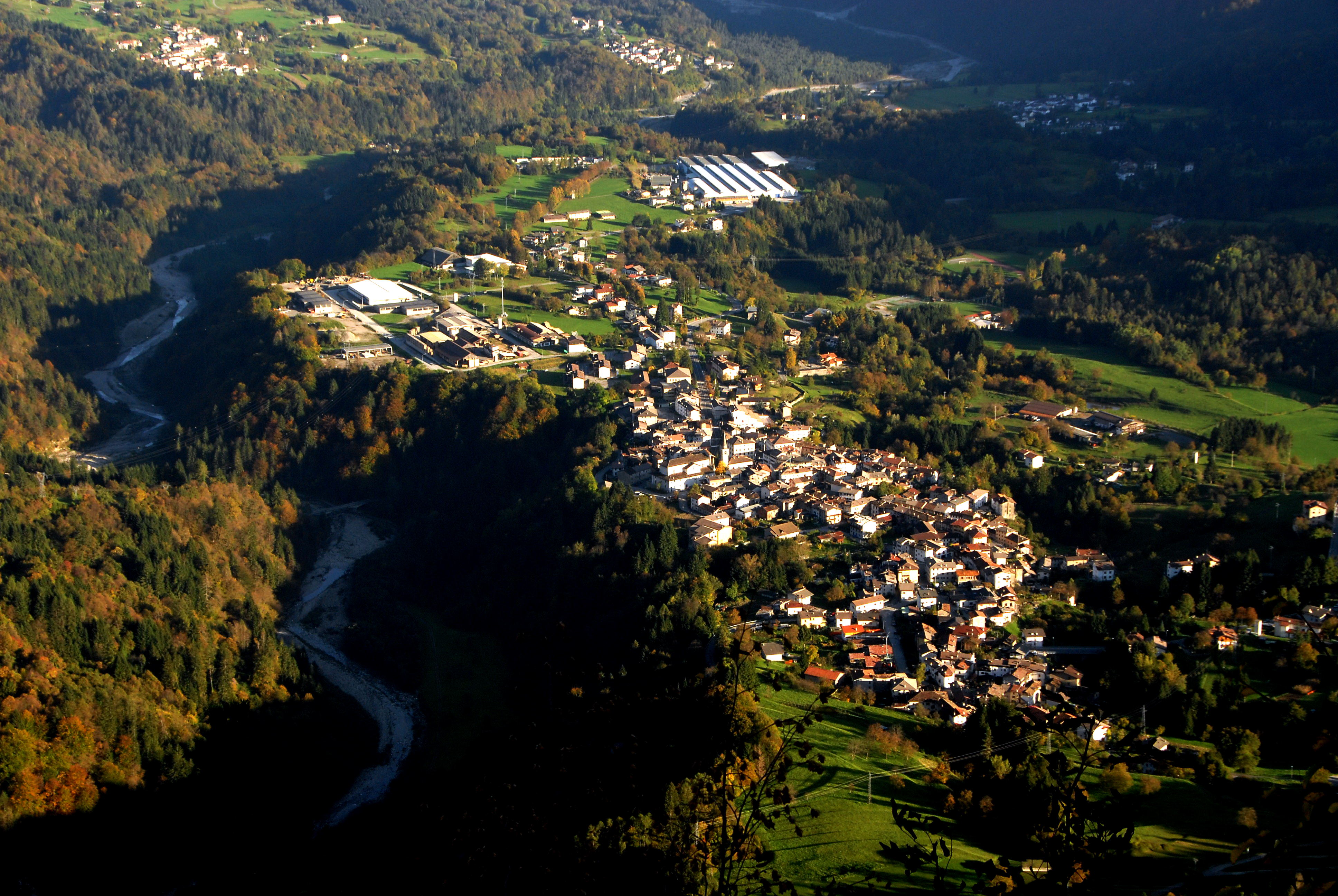 Ampezzo in the community Ampezzo, region Friuli Venezia-Giulia, Italy